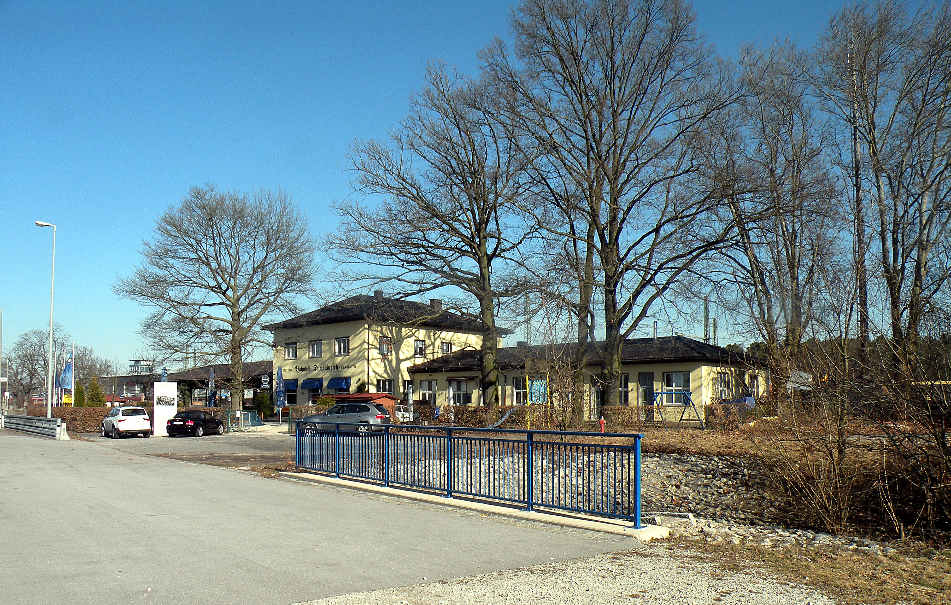 Вокзал "Дутцентайх".